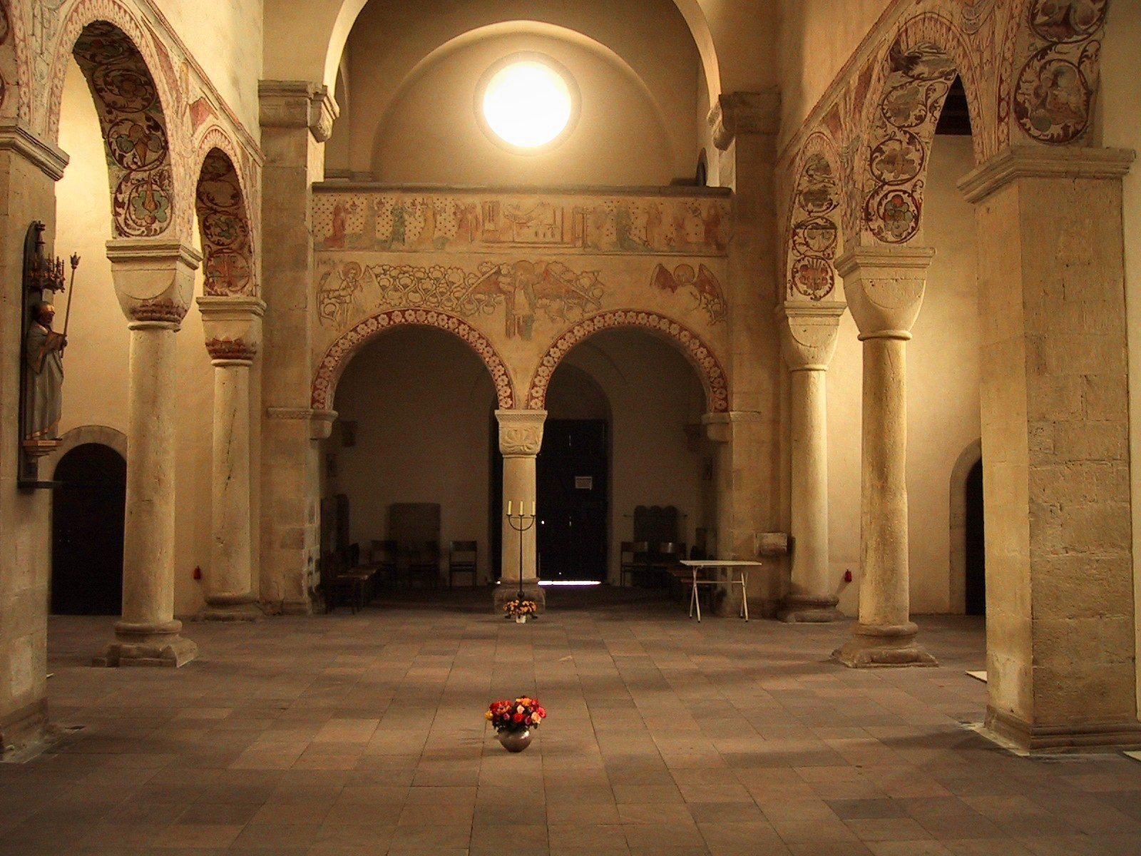 Innenansicht der romanischen Westkirche von Bursfelde